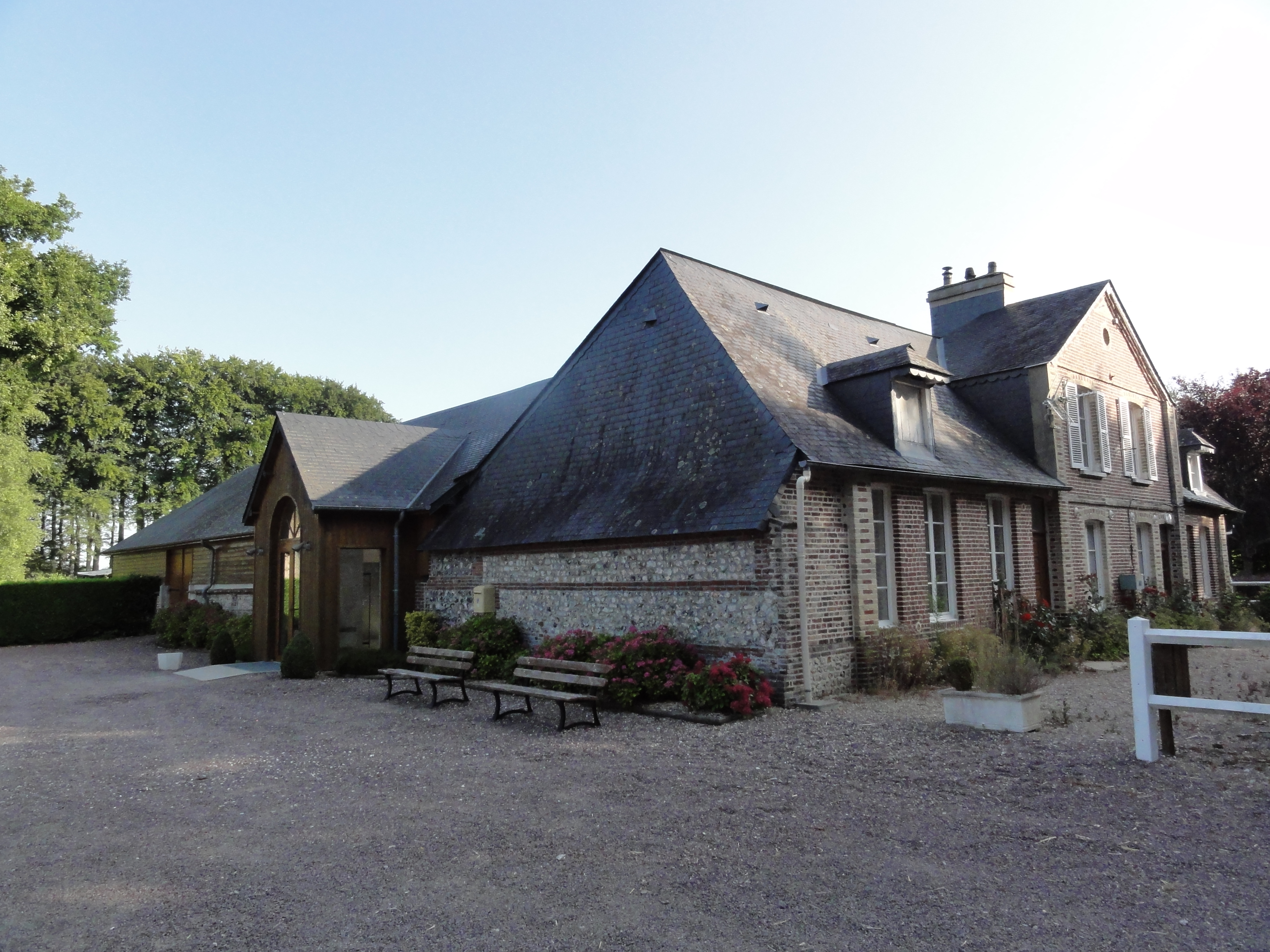 Bennetot (Seine-Mar.) salle polyvalente